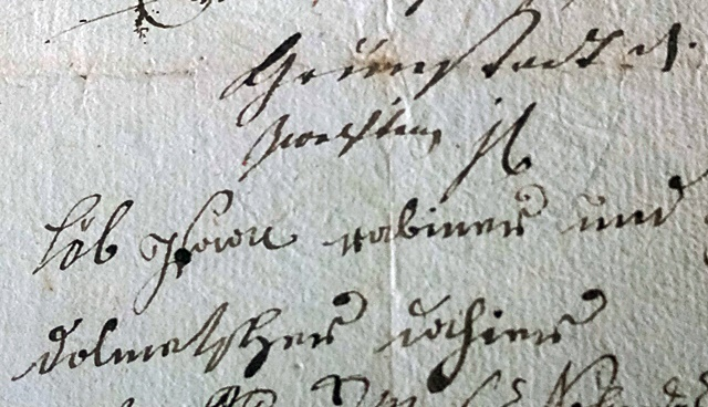 Leopold Roos alias Isaac Löb (+ 1838), Rabbiner und Dolmetscher in Grünstadt, Unterschrift 1804